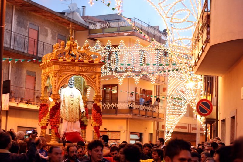 Festa S.Filippo - Limina (ME)